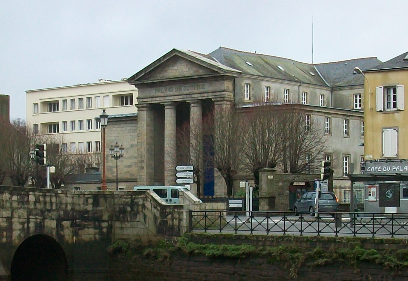 Le tribunal de Grande Instance de Quimper ("Palais de Justice"), sur la rive droite de l'Odet